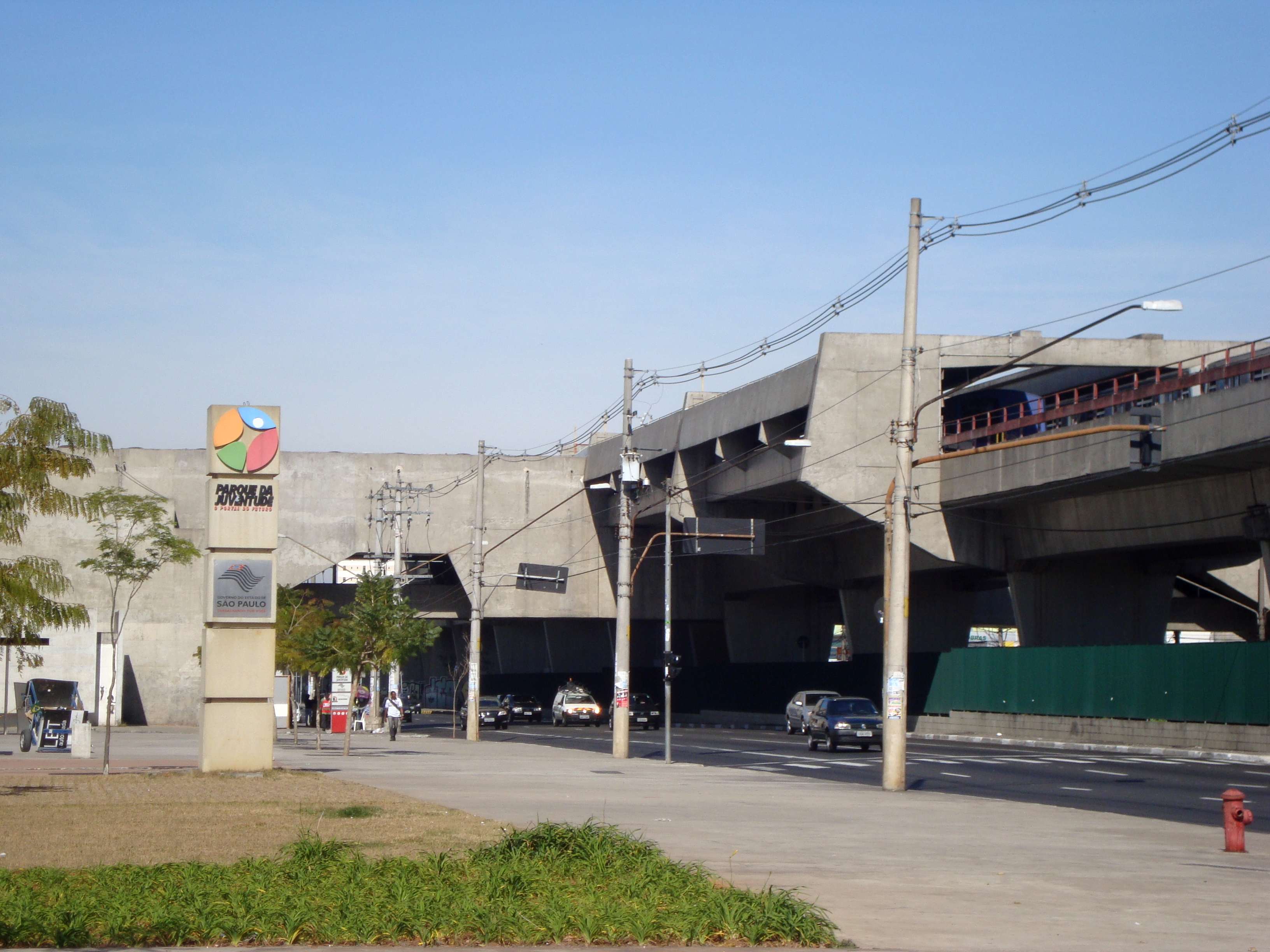 Foto da estação Carandiru do Metrô, na avenida Cruzeiro do Sul, Santana, São Paulo.